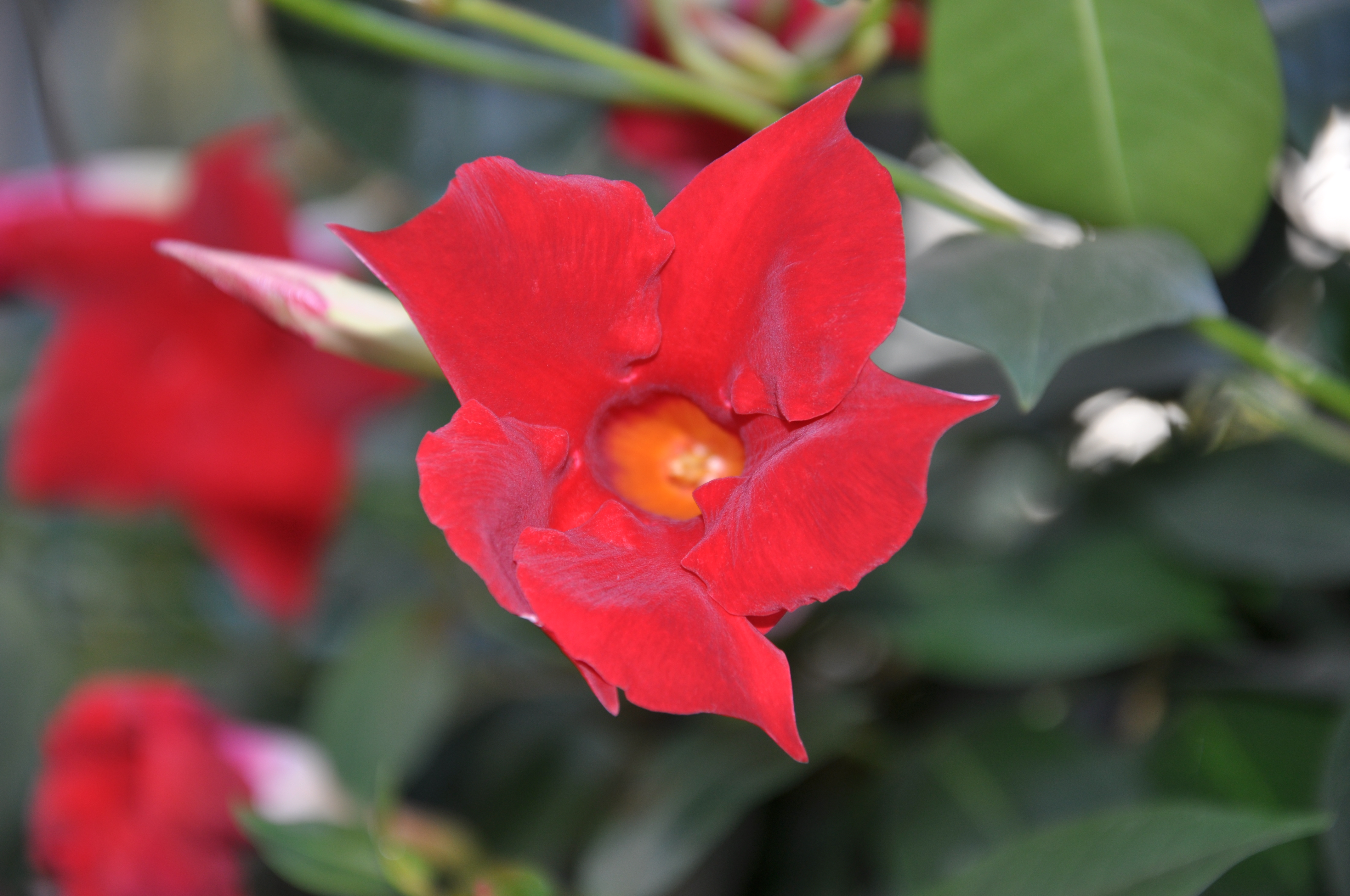 unbekannte Blüte im Grugapark, Essen